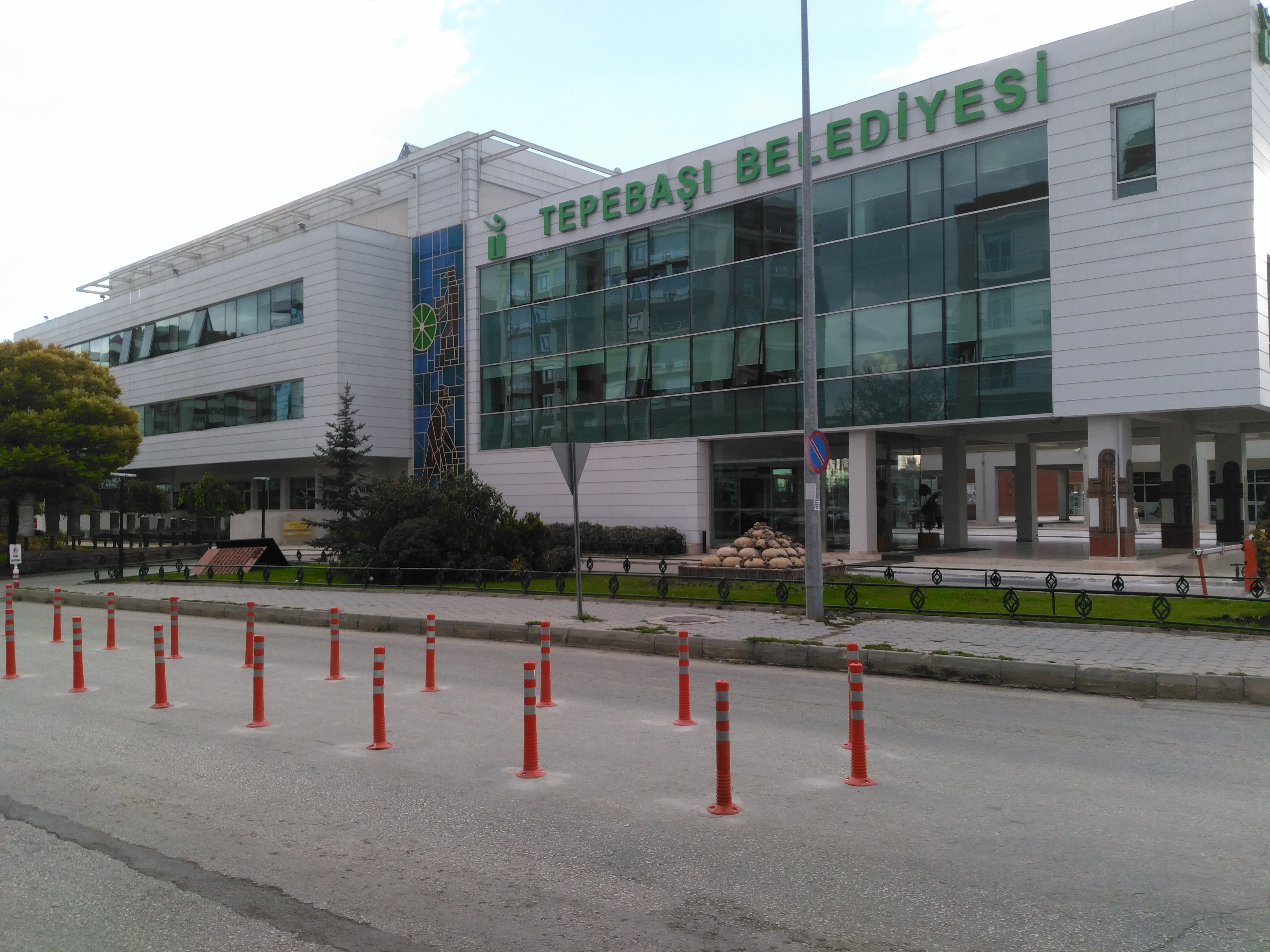 Eskişehir'in Tepebaşı İlçesi belediyesine ait binası.